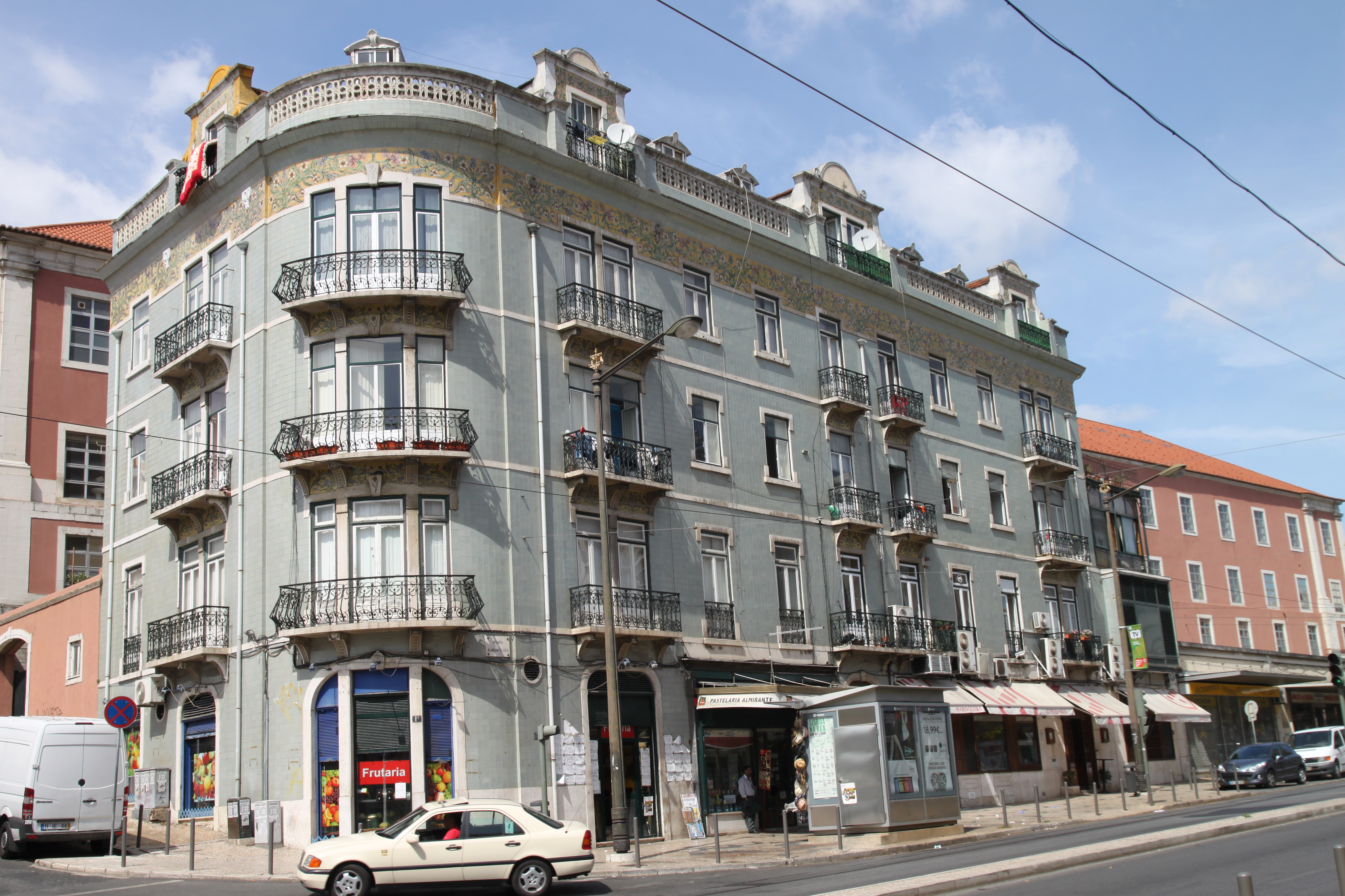 Edifício na Avenida Almirante Reis, n.º 1 a 1C